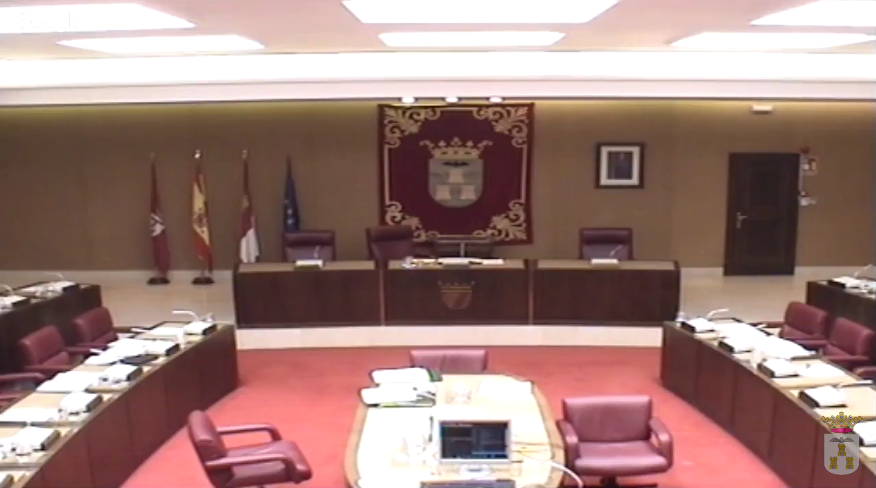 Vista parcial del salón de plenos del Ayuntamiento de Albacete